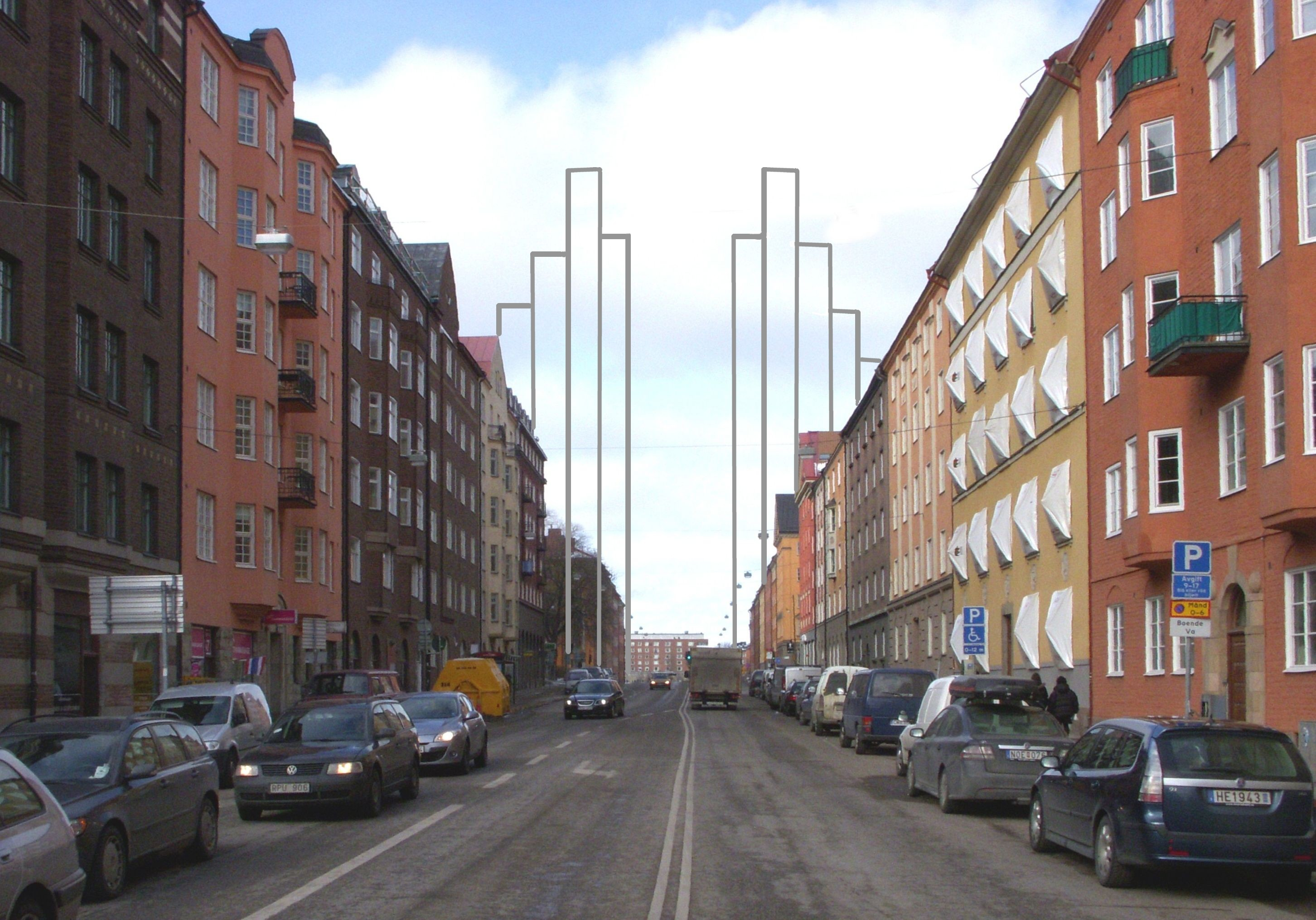 Torsgatan norrut med konturerna för "Tors torn"